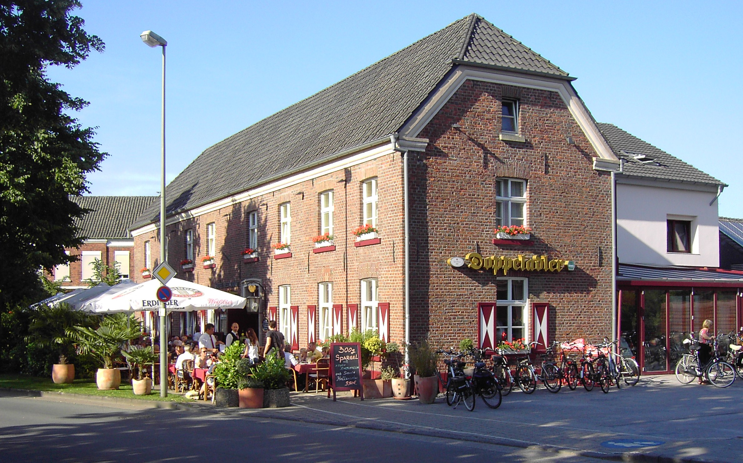 zweigeschossiges Backsteinhaus mit Krüppelwalmdach - heute: Hotel-Restaurant Doppeladler seit 1711 Ortslage: Rees-Haldern, Bahnhofstraße 48 Eintragung in die Denkmalliste der Stadt Rees: 18.07.1988